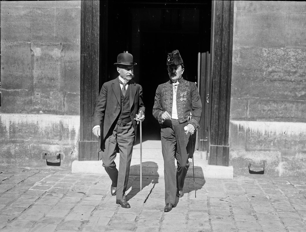 Paul Deschanel, ancien président de la République et membre de l'Académie française, et Robert de Flers, lors de la réception de celui-ci à l'Académie.